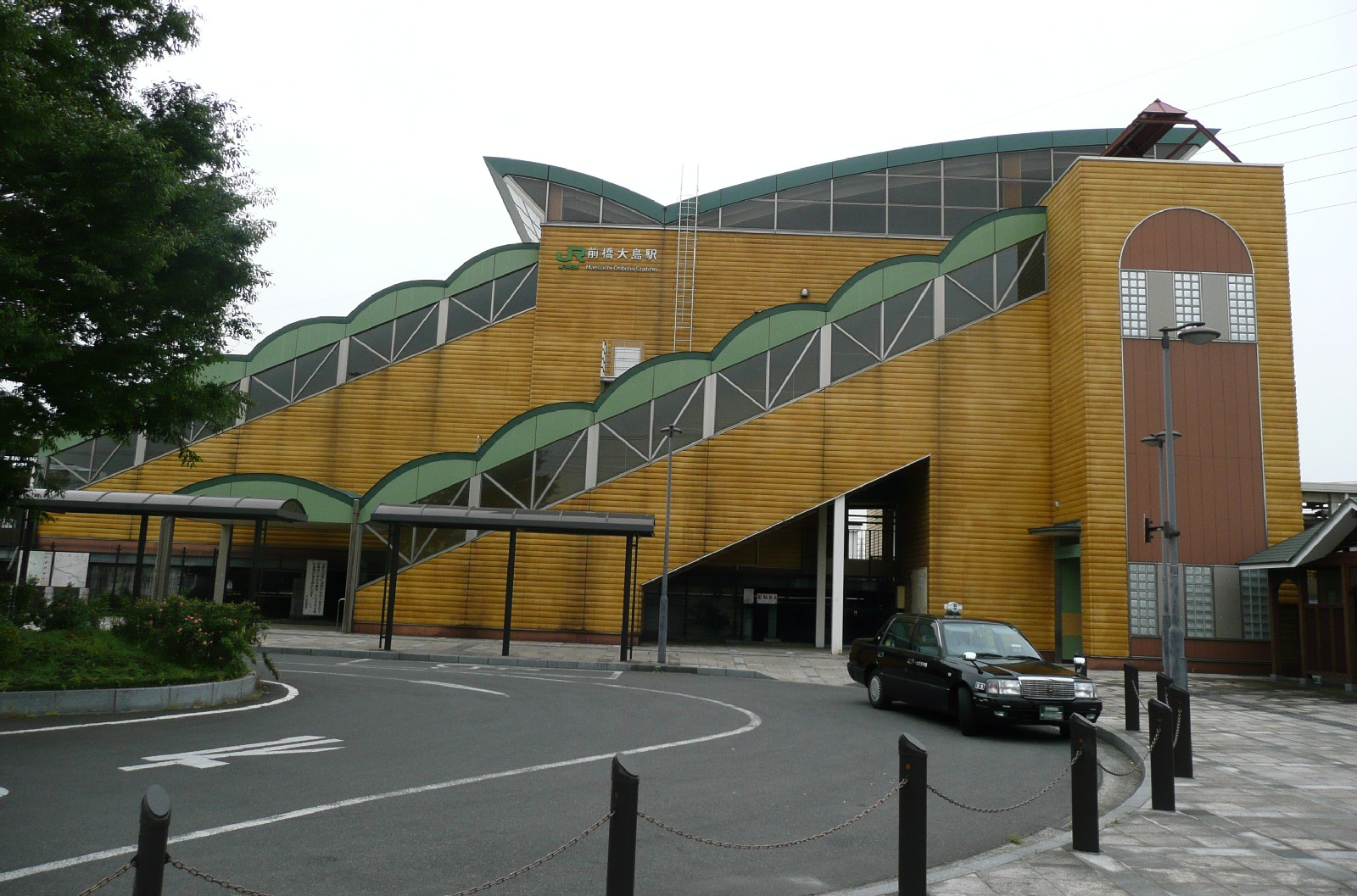 前橋大島駅北口